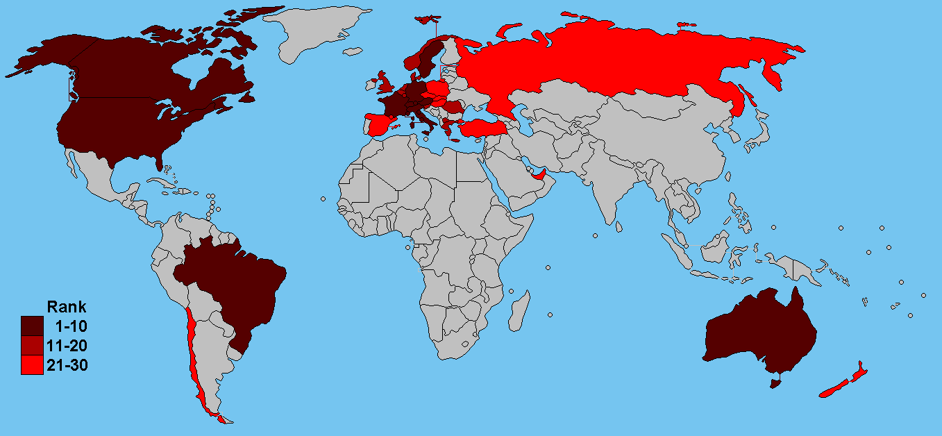 Vyznačené země, kde se lze potkat se srbskou menšinou